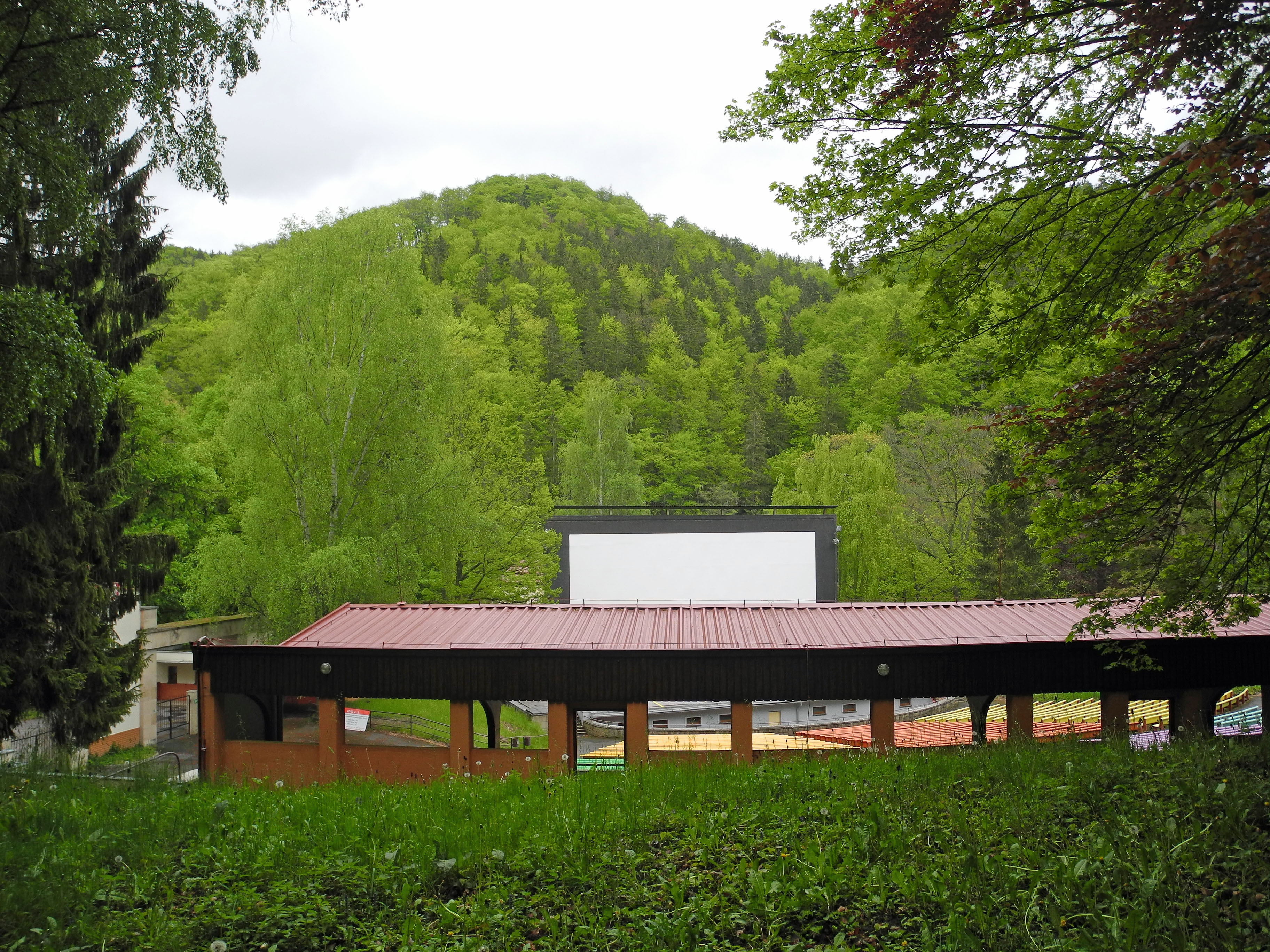 Freilichtbühne (Sommerkino) in Karlsbad - Karlovy Vary